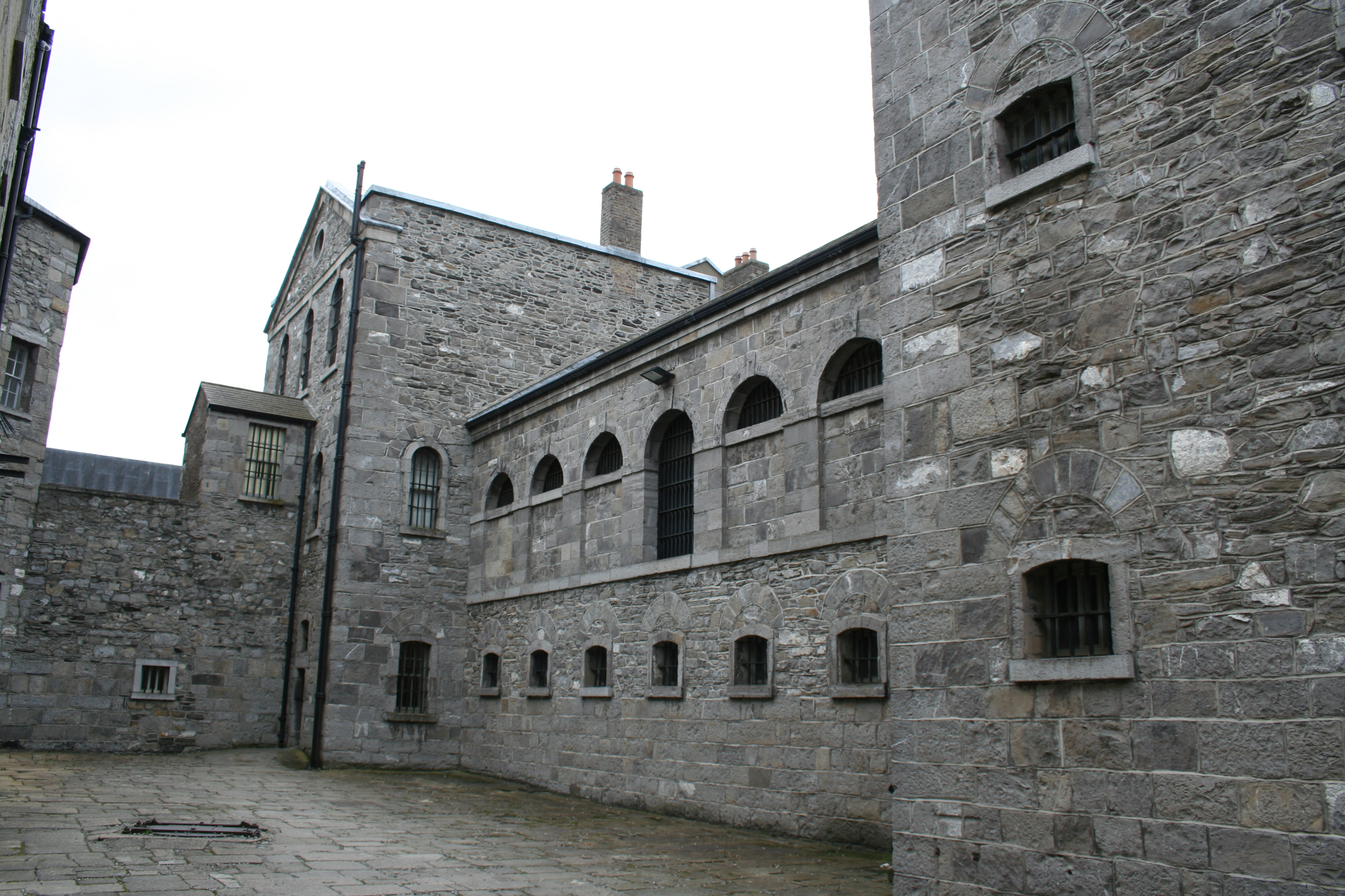 Cárcel de Kilmainham, DublínCárcel de Kilmainham